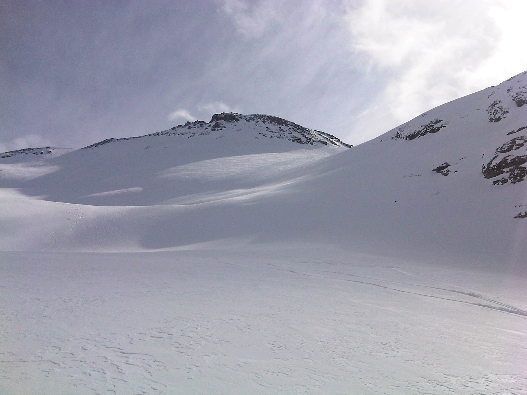 sur le versant nord de la Grande Aiguille Rousse, le glacier des sources de l'Isère. Près de Val d'Isère.